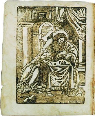 Іаан Дамаскін. Гравюра В. Вашчанкі. 1702 г.